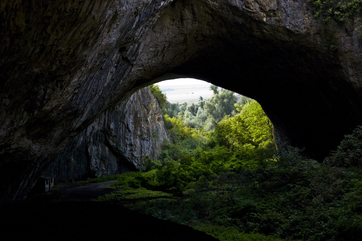 Деветашка пещера